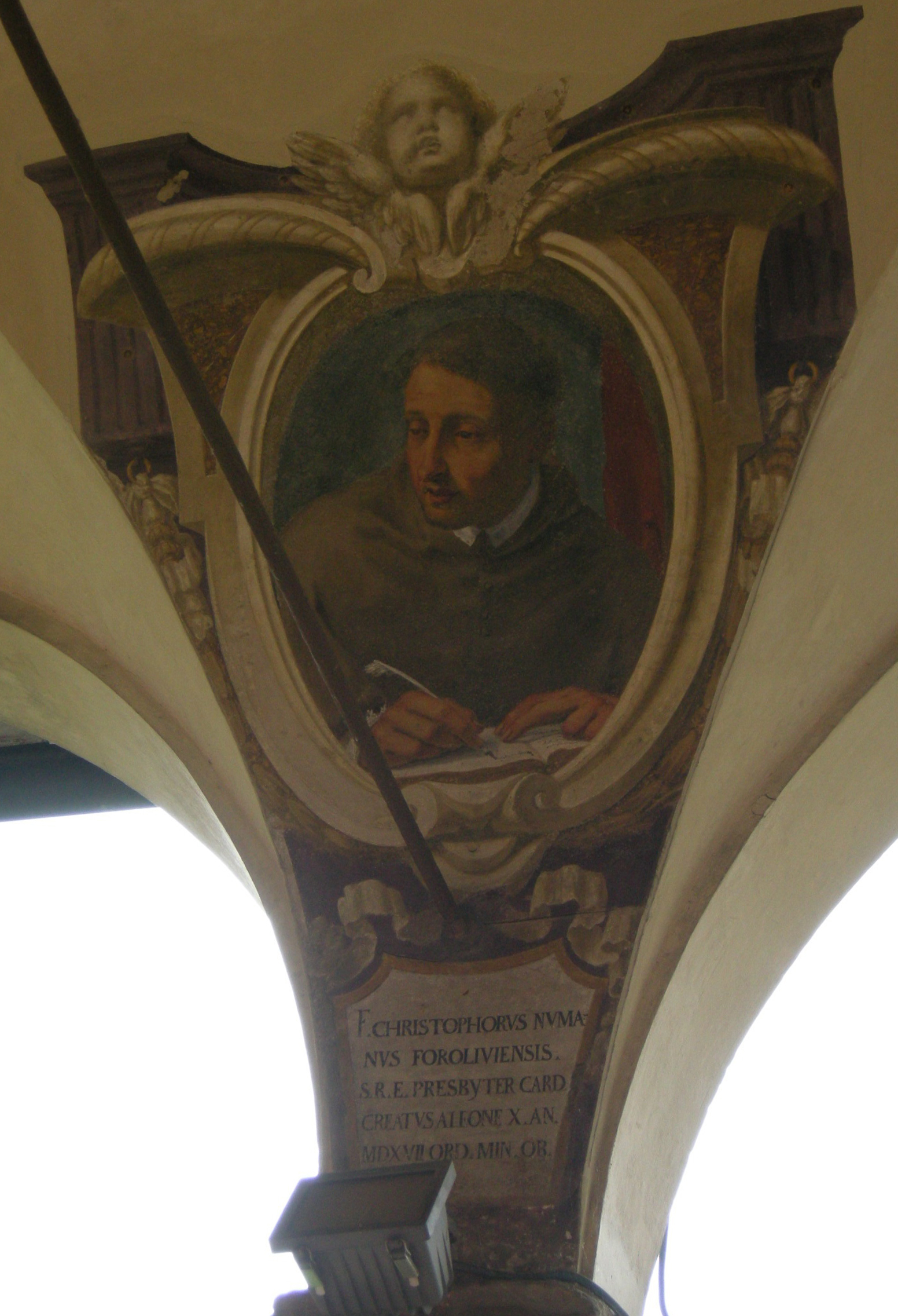 Chiostro di ognissanti, personalità francescane 44 Cristoforo Numai da Forlì